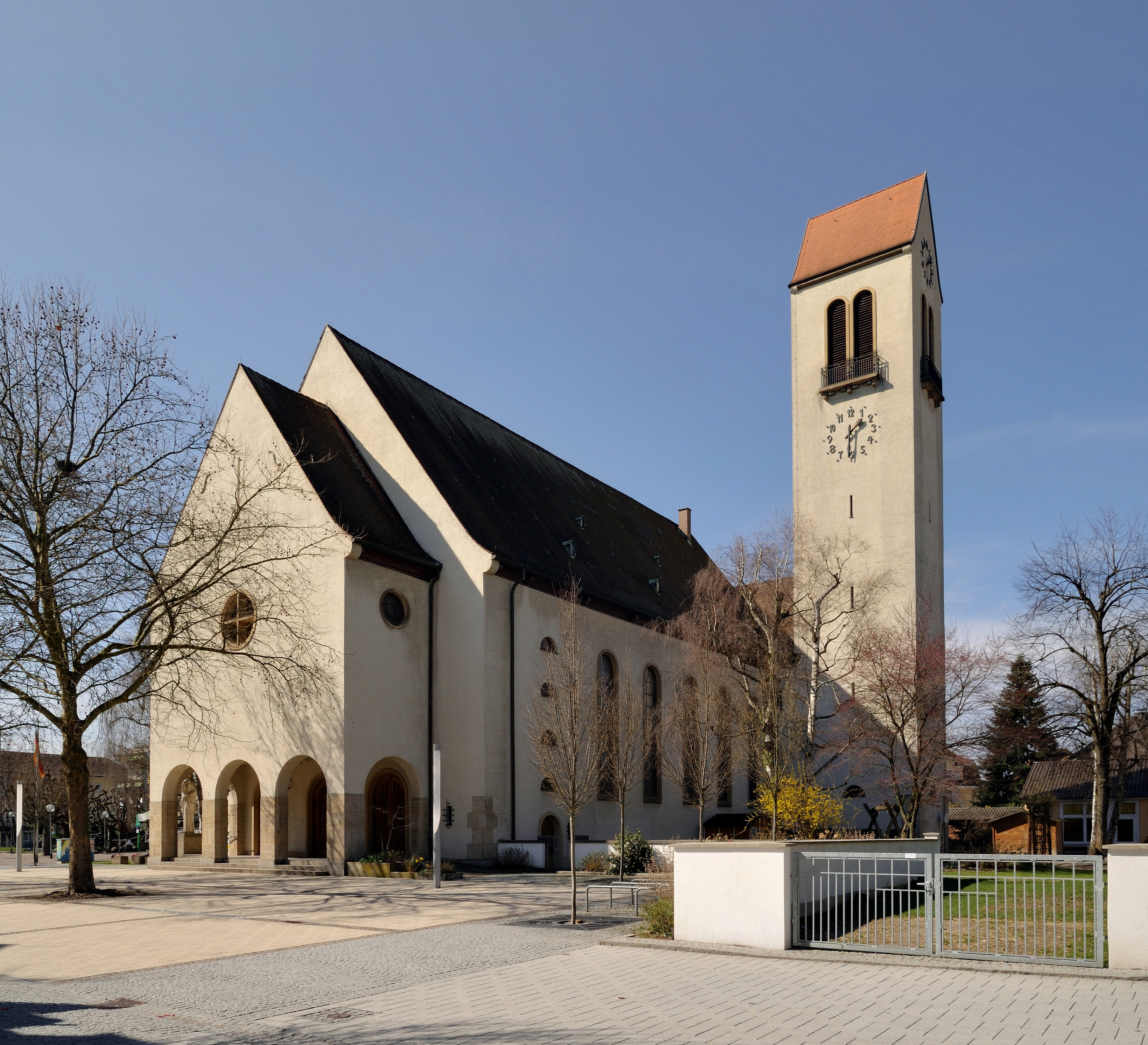 Rheinfelden: Christuskirche